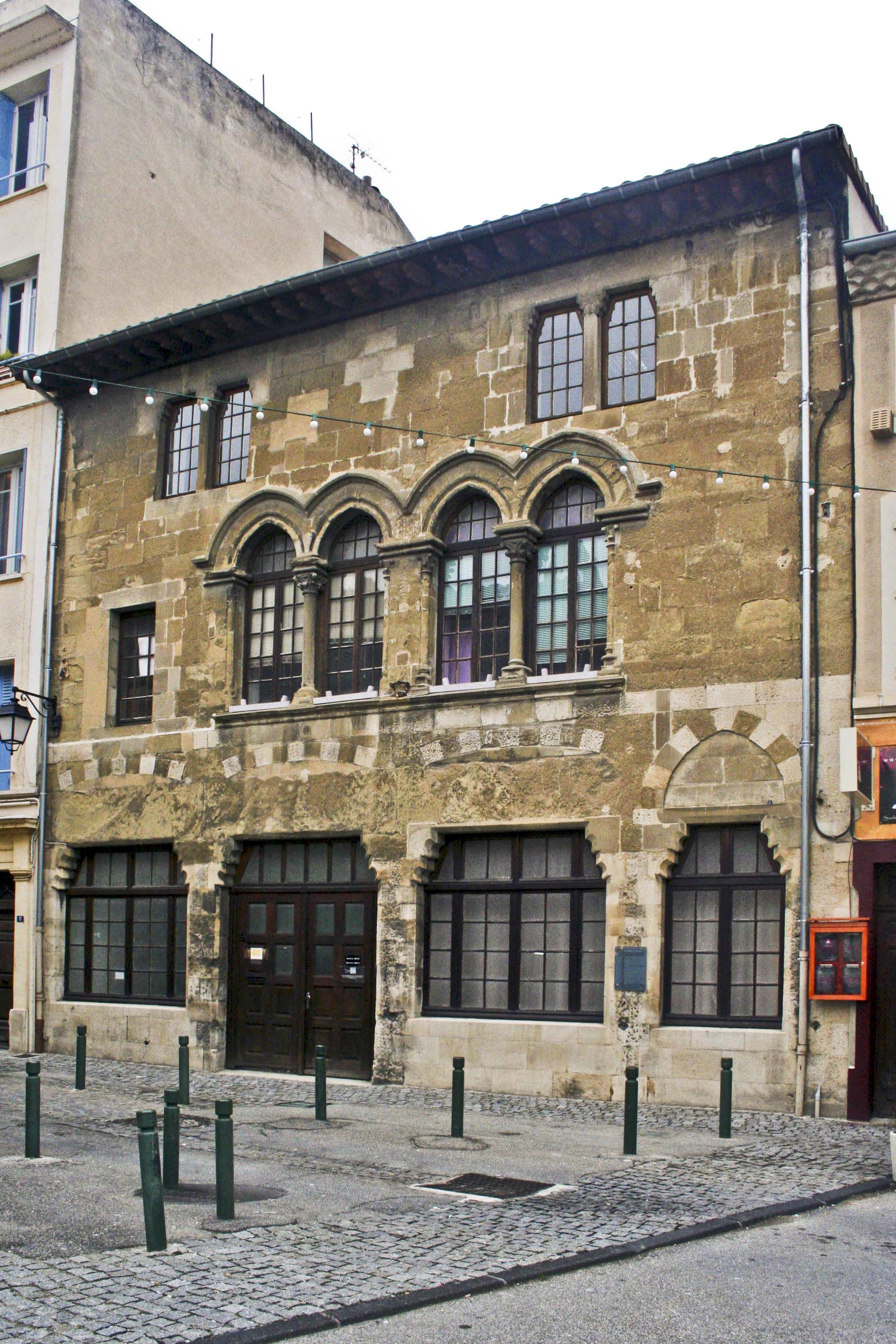 La Maison du Drapier, Valence (Drôme), France